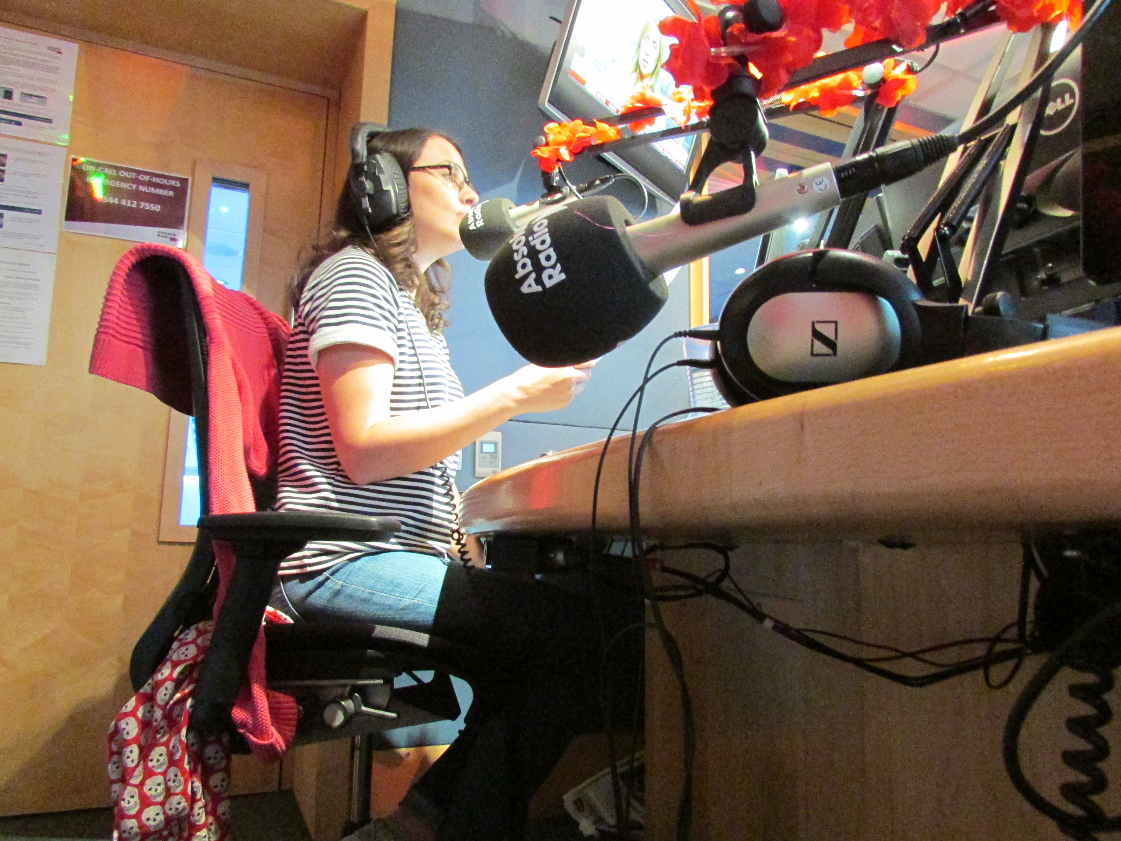 Geoff Lloyd's Hometime Show